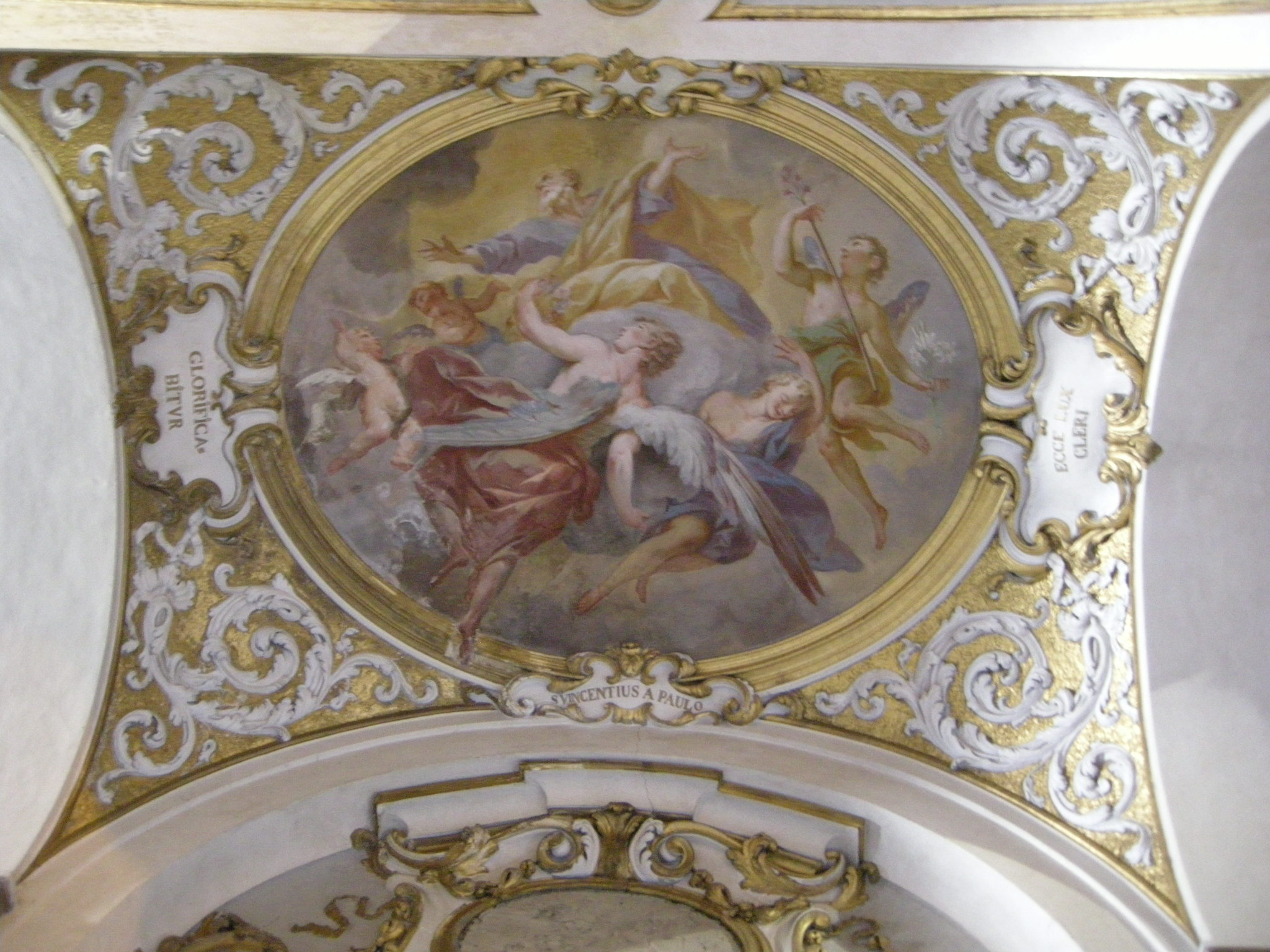 San Jacopo Soprarno, interno, altare dx 3 ottavio dandini, gloria di san giuseppe